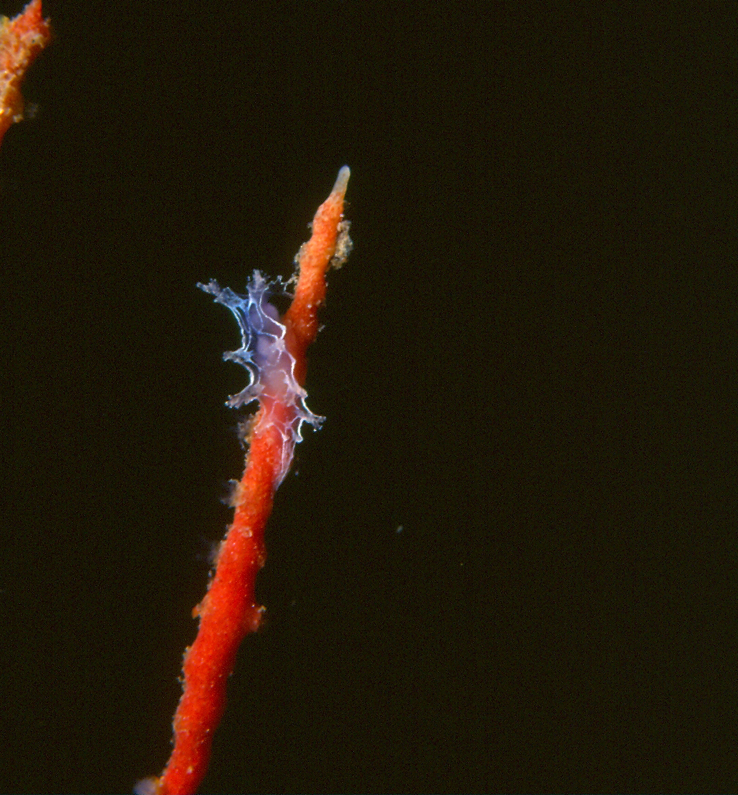 Marionia blainvillea (Risso, 1818) - juvenile : 5 mm, Leptogorgia sarmentosa (Esper, 1791) - Banyuls-sur-Mer : 07/90